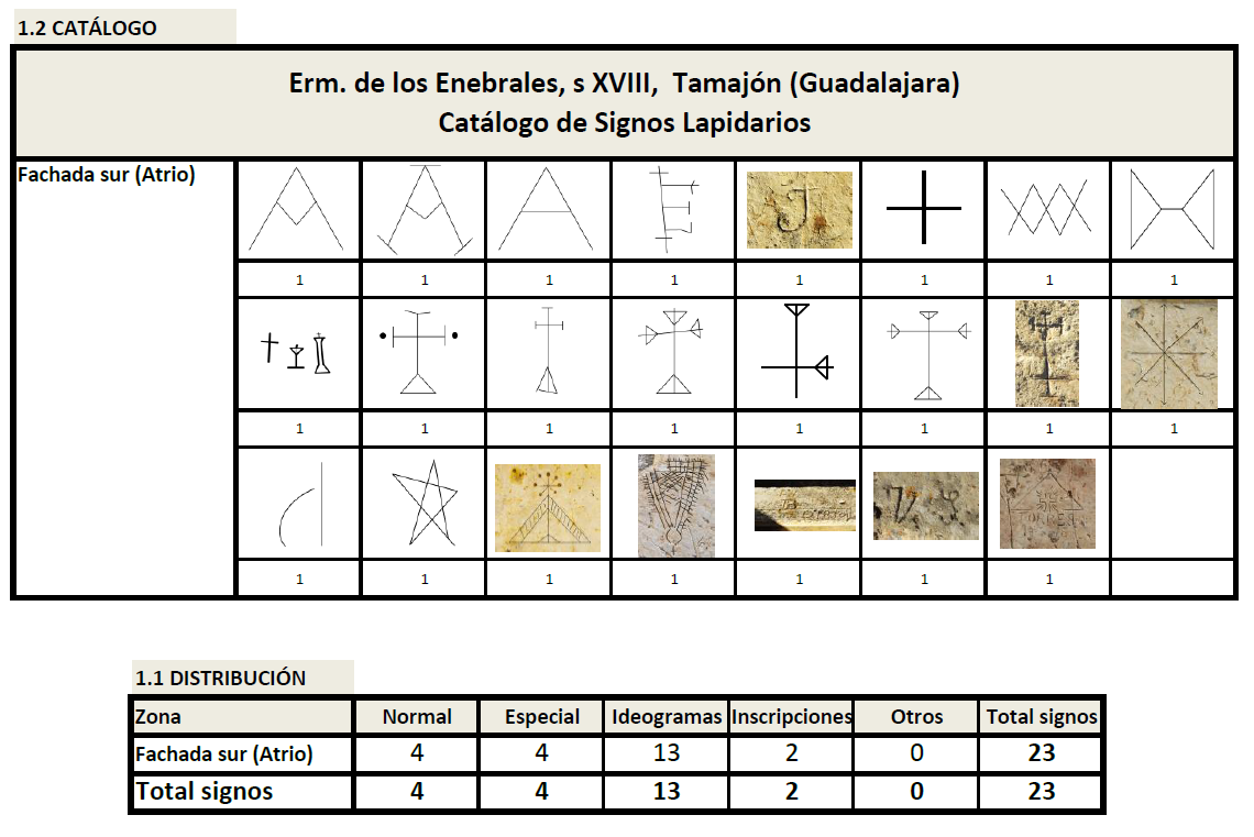 Ermita de Nuestra Sra. de los Enebrales, Tamajón (Guadalajara), Castilla-La Mancha, España, románica s. XVI. Catálogo de signos lapidarios.